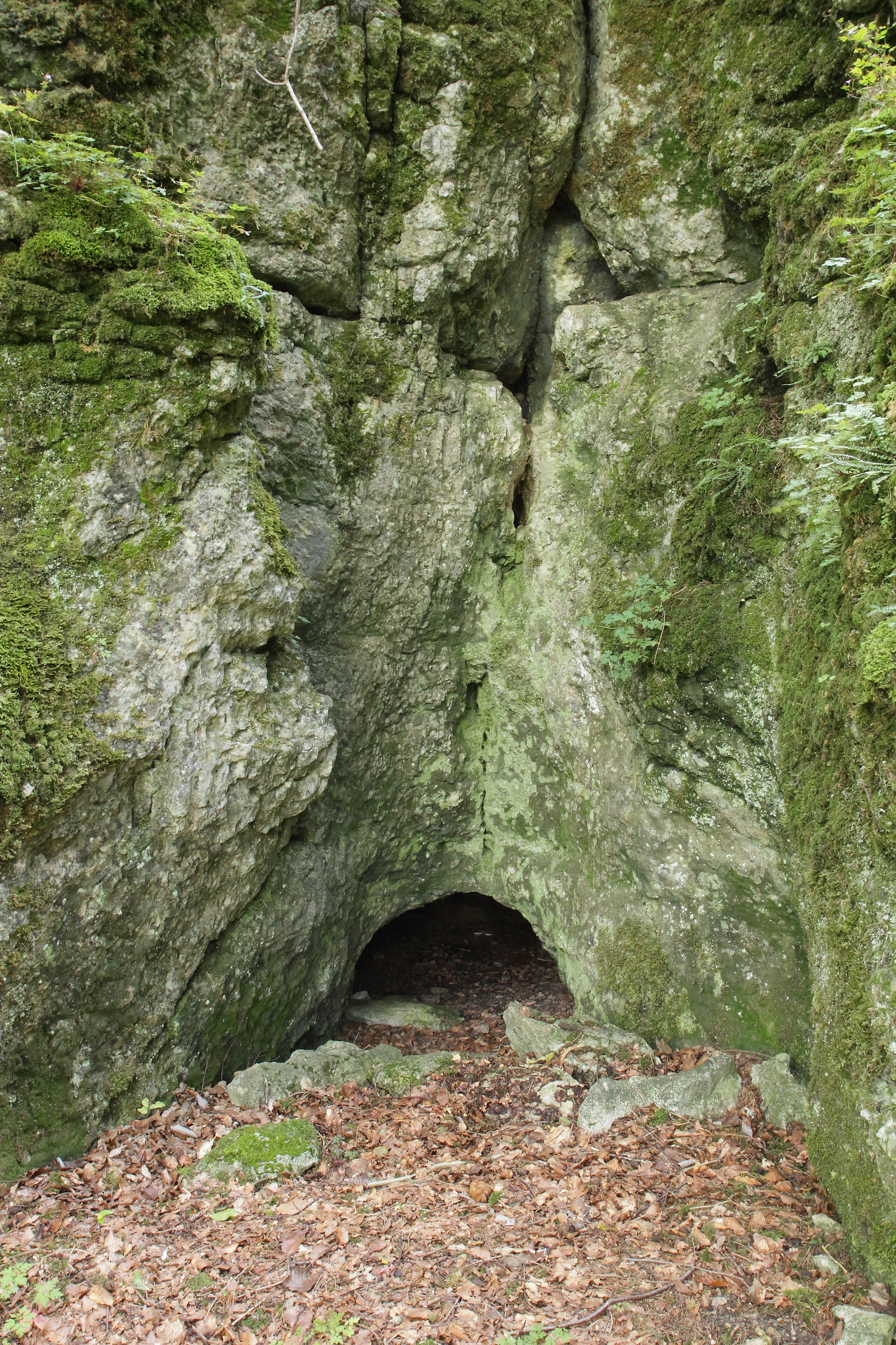 Eingang des Teufelsloches